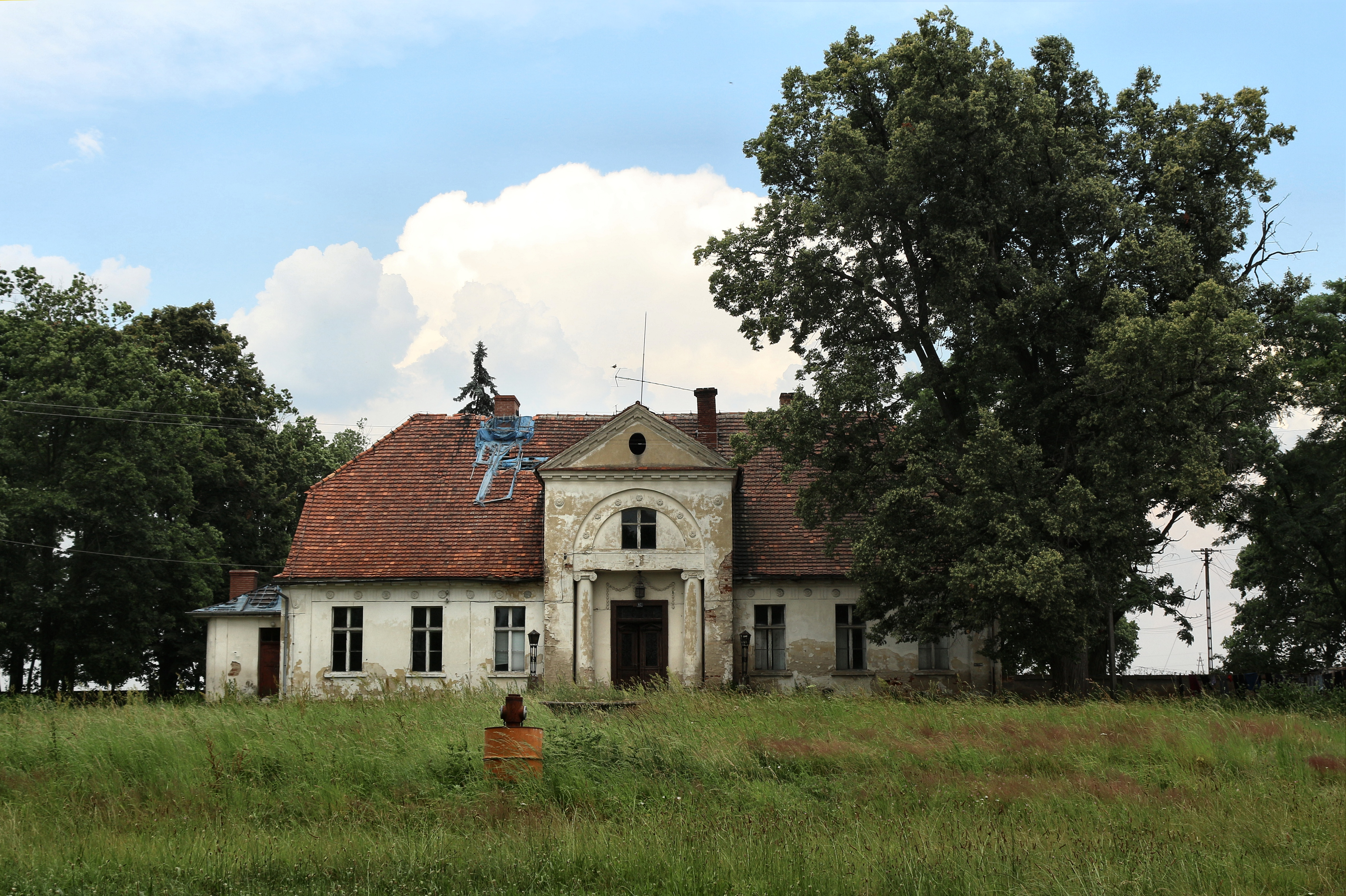 Osowa Sień (Dolna), dwór, pocz. XIX